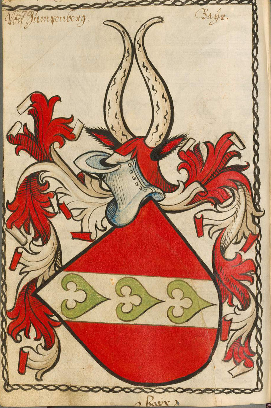 Scheibler'sches Wappenbuch , älterer Teil; Seite 278 Von Gumpenberg Bayern